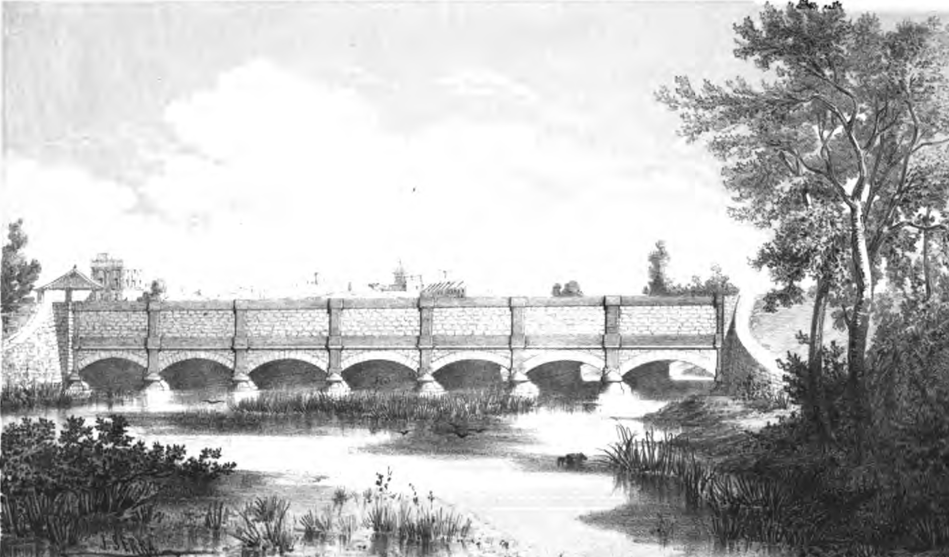 Extret del Llibre Reseña del Canal de Urgel. Publicat per la SA Canal de Urgel al 1861.